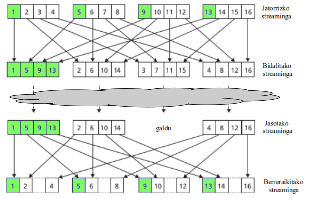 Interleavingaren funtzionamendua